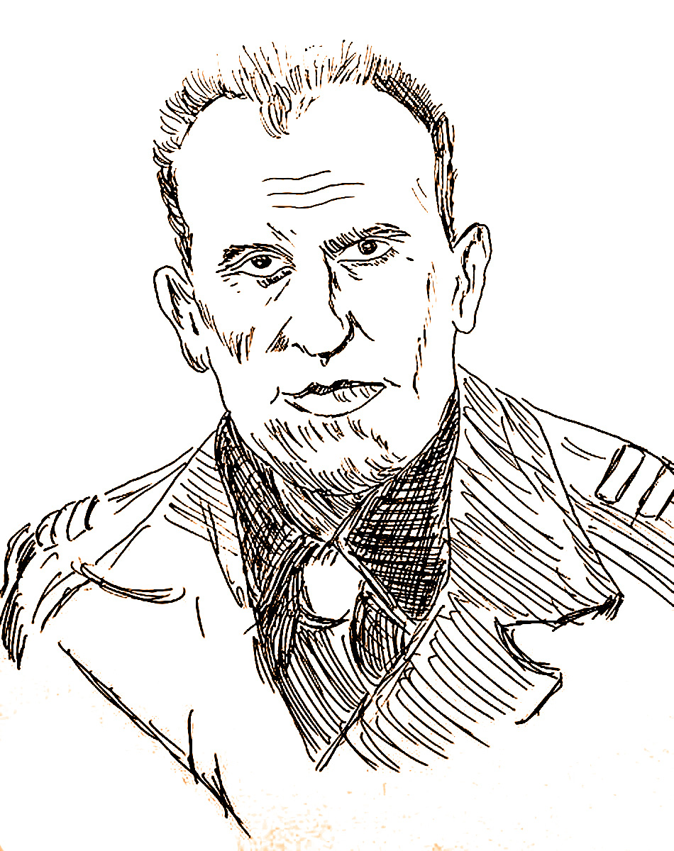 René Char Capitaine Alexandre